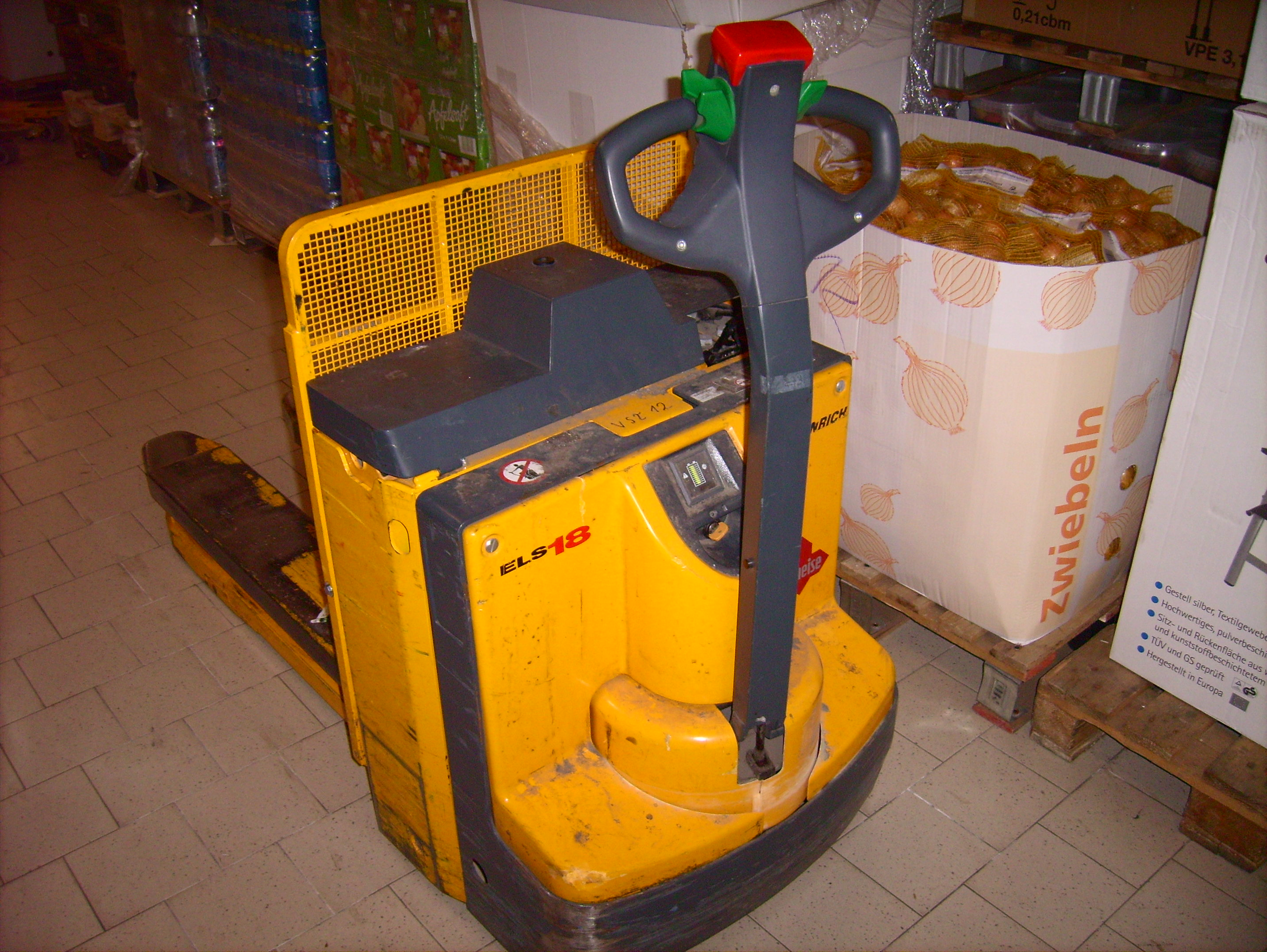 Elektrischer Hubwagen der Firma Jungheinrich